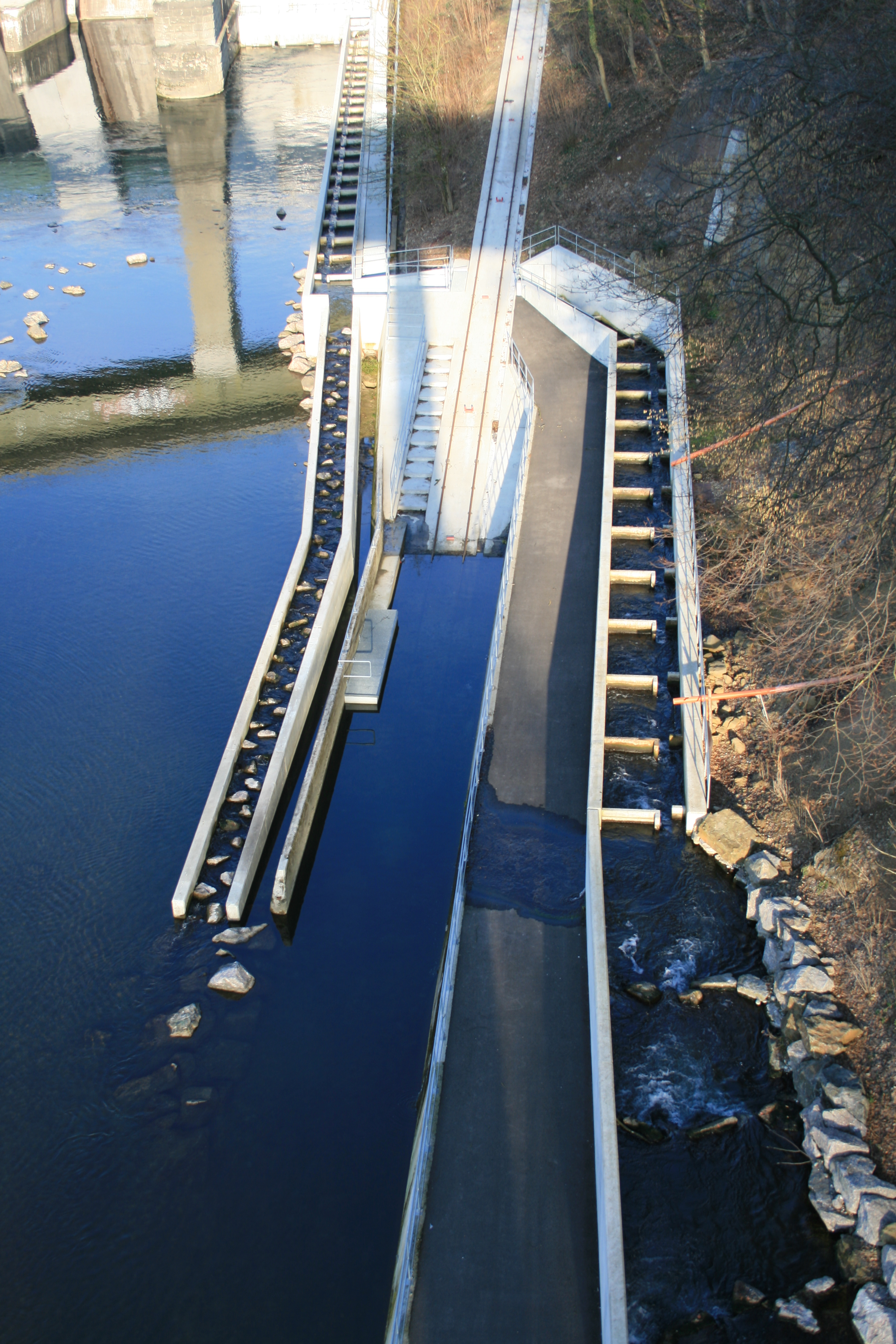 Fischtreppe auf der Neuenhofer Seite der Staumauer des Wettinger Stausees, Aargau, Schweiz